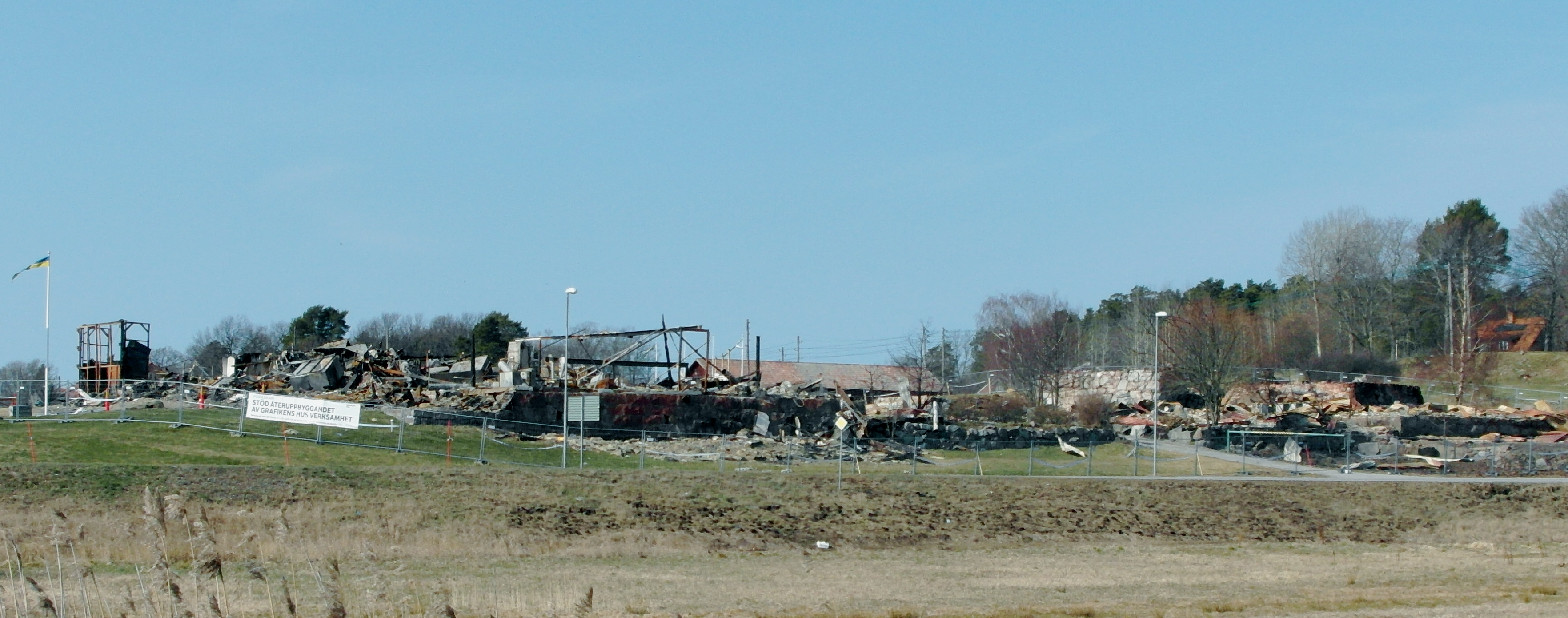 Brandresterna efter branden som totalförstörde Grafikens hus utställningshall i ekonomibyggnaderna vid Gripsholms Kungsladugård, Mariefred